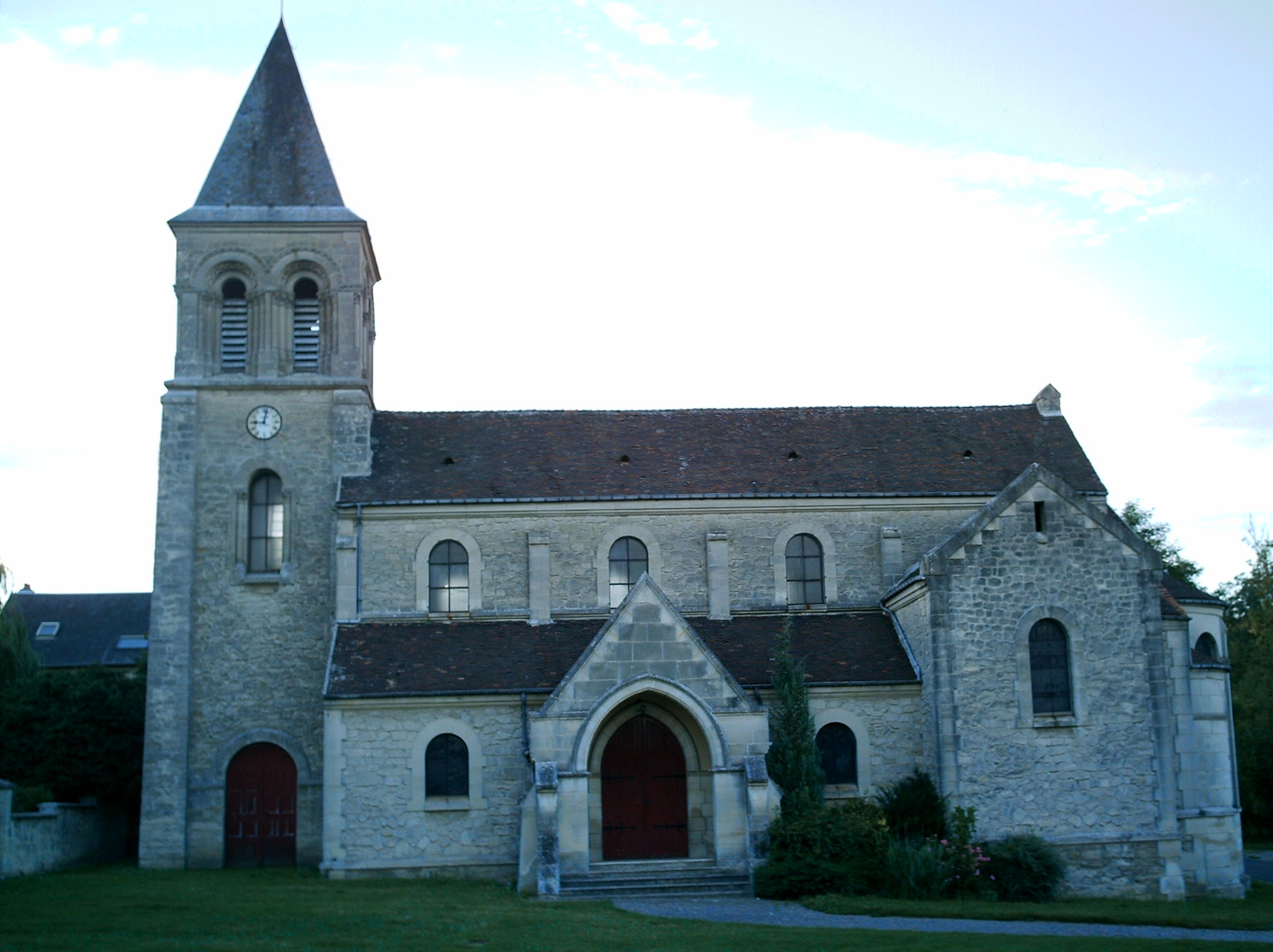 Eglise de la Commune de CHEVREGNY (02000 FRANCE)